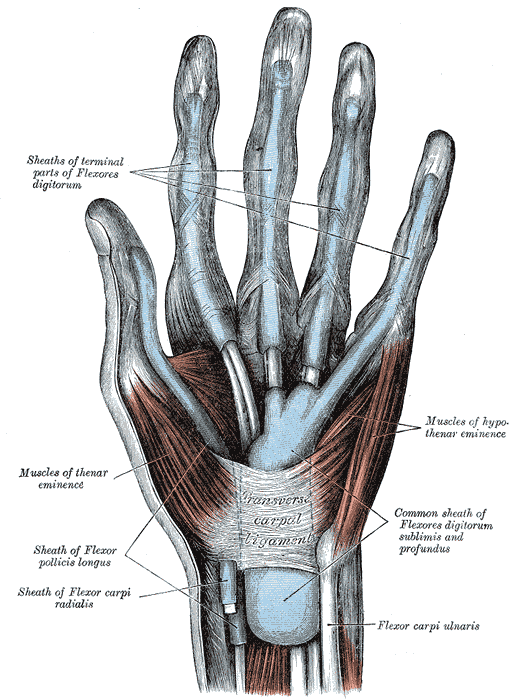 Vista del palmell de la mà dreta amb la disposició de músculs i beines, destacant les eminències tènar i hipotènar